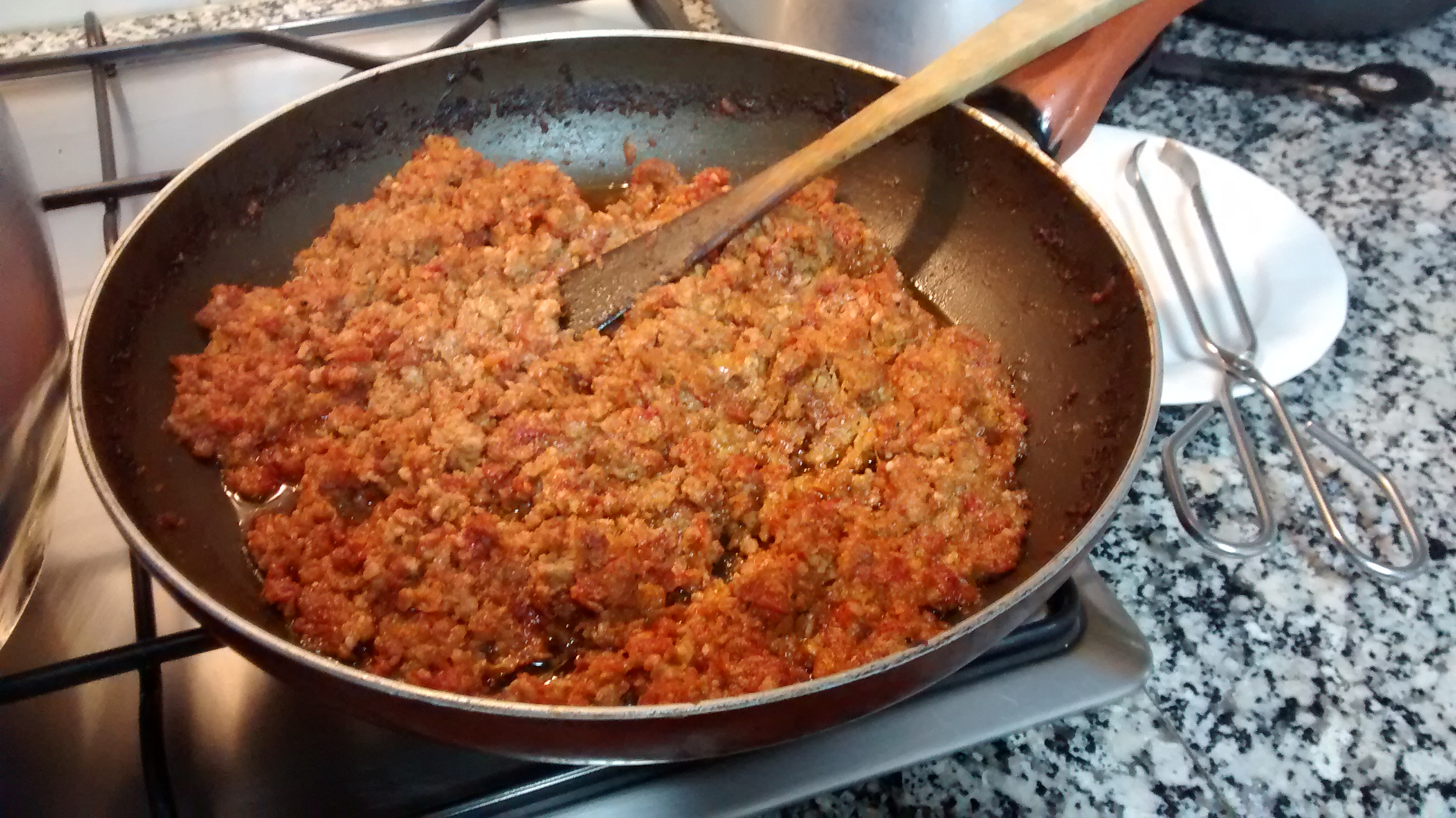 Sofregit de ceba, tomata i carn picada